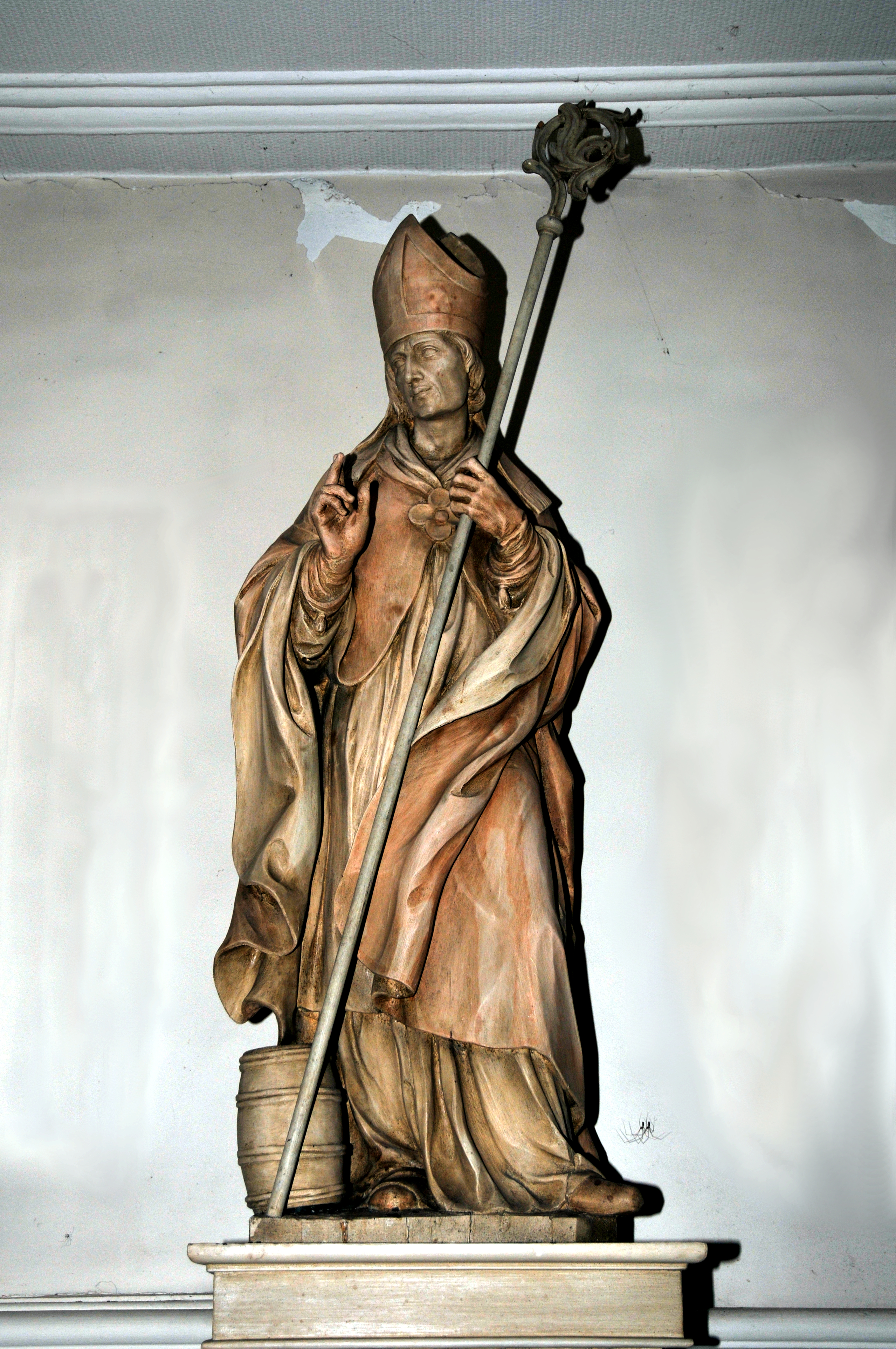 Den Hellege Willibrord mat sengem Fässchen an der Kierch zu Méchela - d'Statu erënnert u säi "Waiwonner".